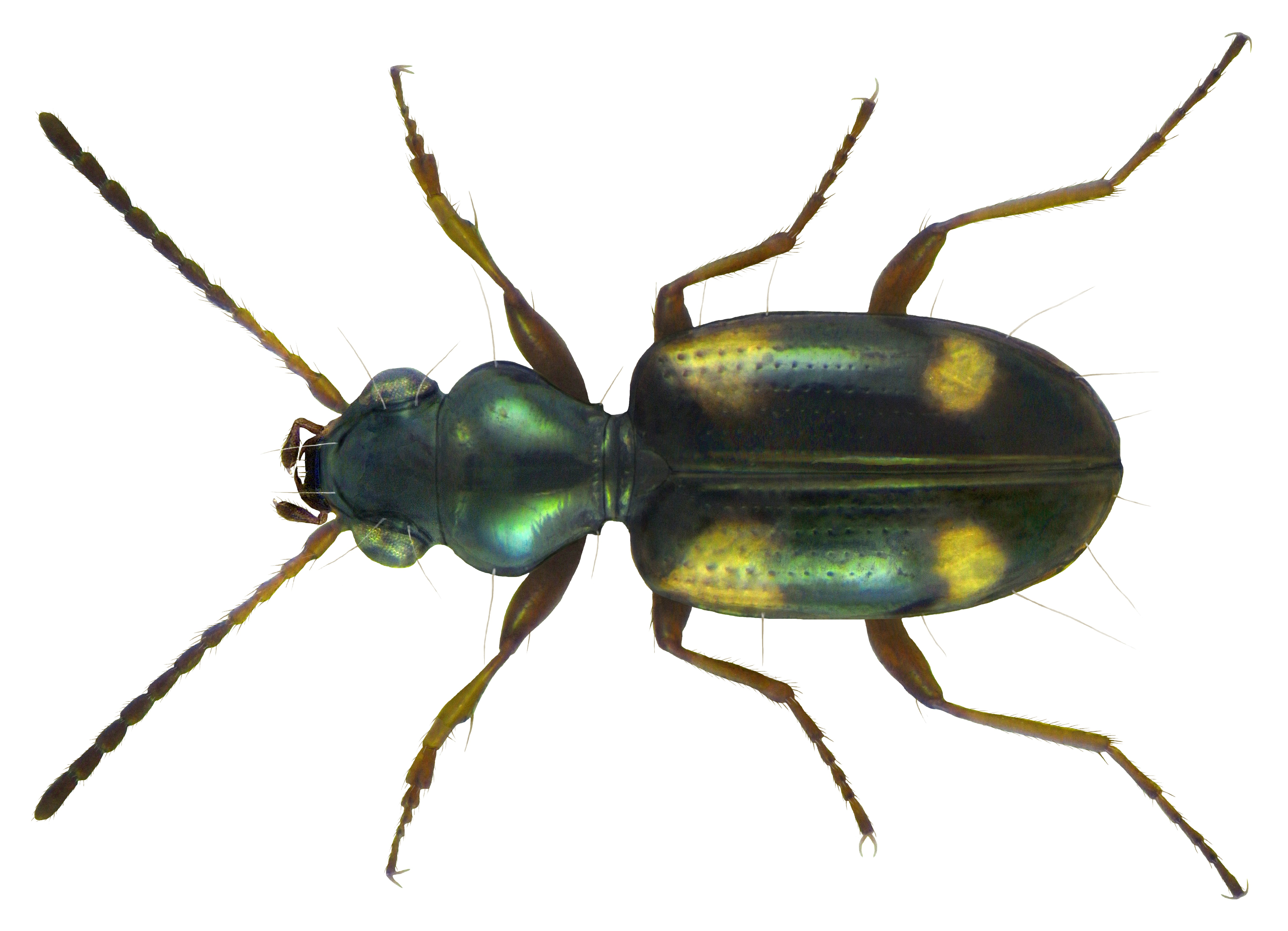 Familie: Carabidae Größe: 2,5-3,6 mm Verbreitung: Palaearktis und Nordamerika Ökologie: auf trockeneren Standorten Fundort: Germania, Oberfanken, Kulmbach leg.det. U.Schmidt, 1972 Foto: U.Schmidt, 2011